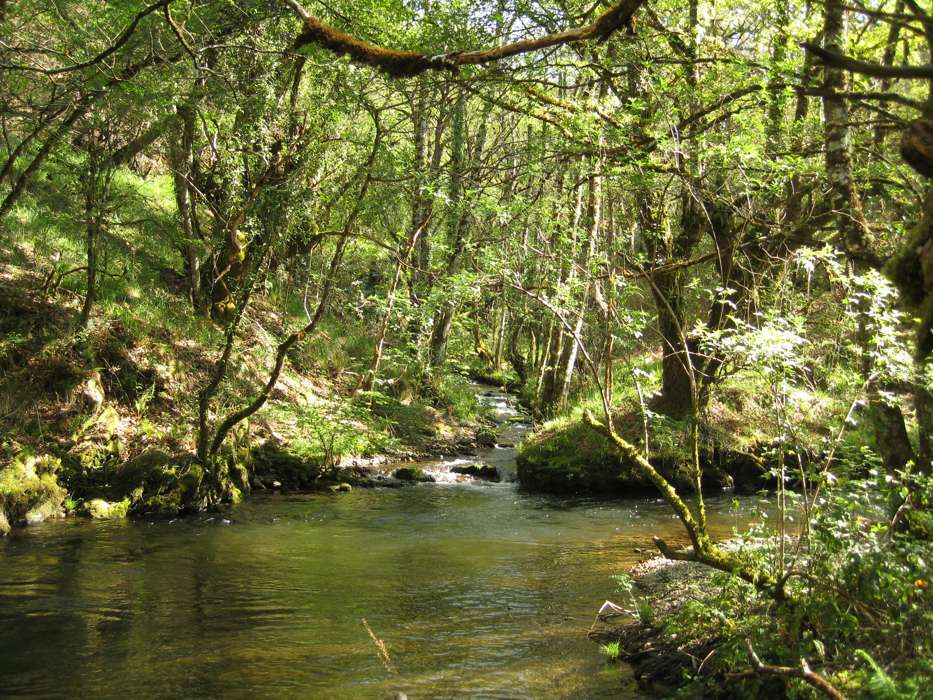 O rio Pontigón (esquerda) desemboca no rio Rodil, perto de Vilardiaz, na parroquia da Veiga de Logares no concello da Fonsagrada (Lugo) This is a photography of a Special Area of Conservation in Spain with the ID: ES1120006. Natura2000 entry, EEA entry